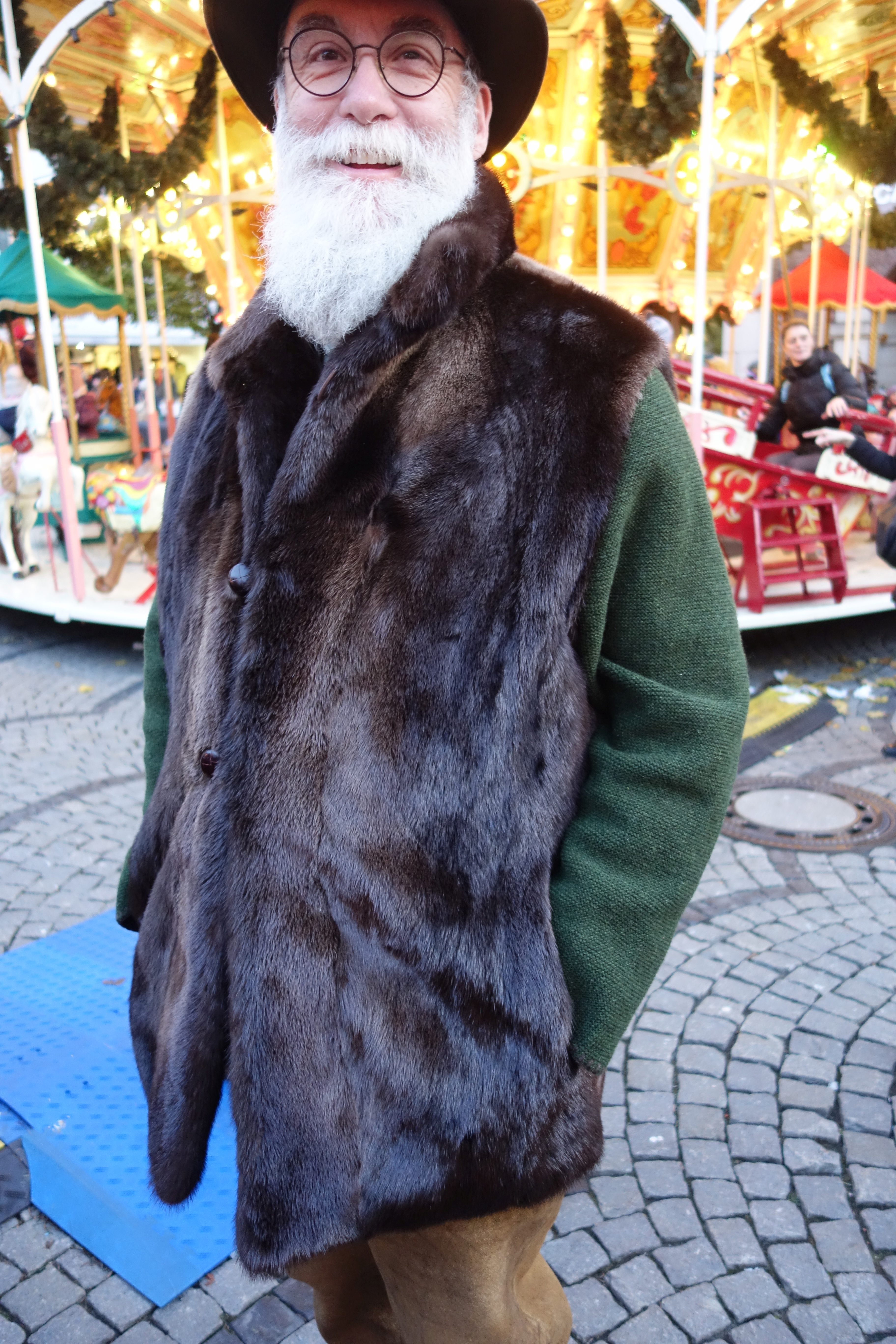 Jacke aus Kanadischem Otter. Düsseldorf, Weihnachtsmarkt Oktober 2019.